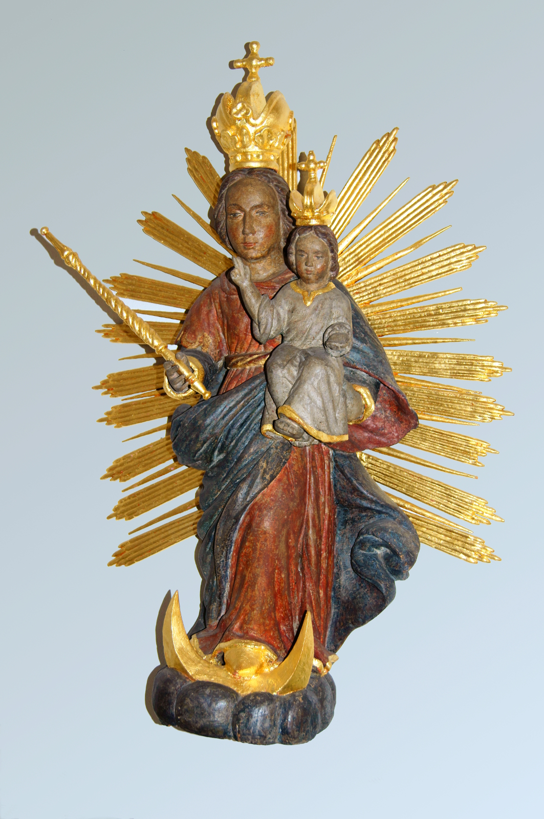 Die Strahlenmadonna in der Beichtkapelle der Klosterkirche St. Marien Burlo, Stadt Borken (NRW), wurde im späten 16. Jahrhundert gefertigt und stammt vermutlich aus Süddeutschland. This is a photograph of an architectural monument. A1 - A 26